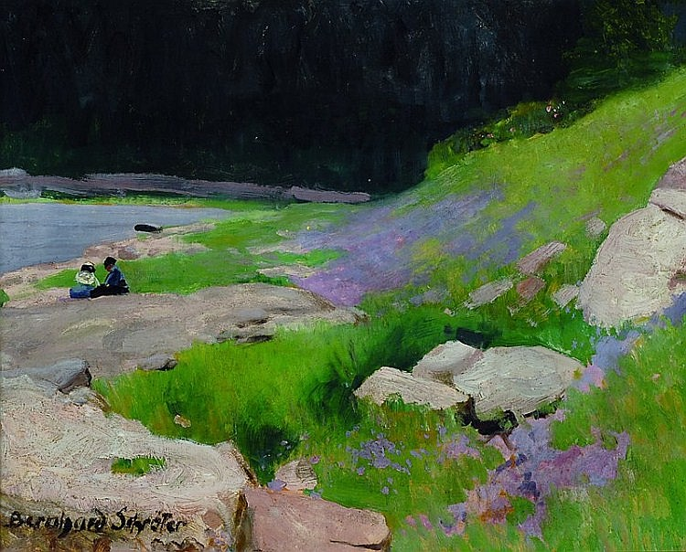 Bernhard Schröter (1848-1911) - Felsen am Bachlauf, Öl/Malkarton, links unten signiert, ca. 39x49cm